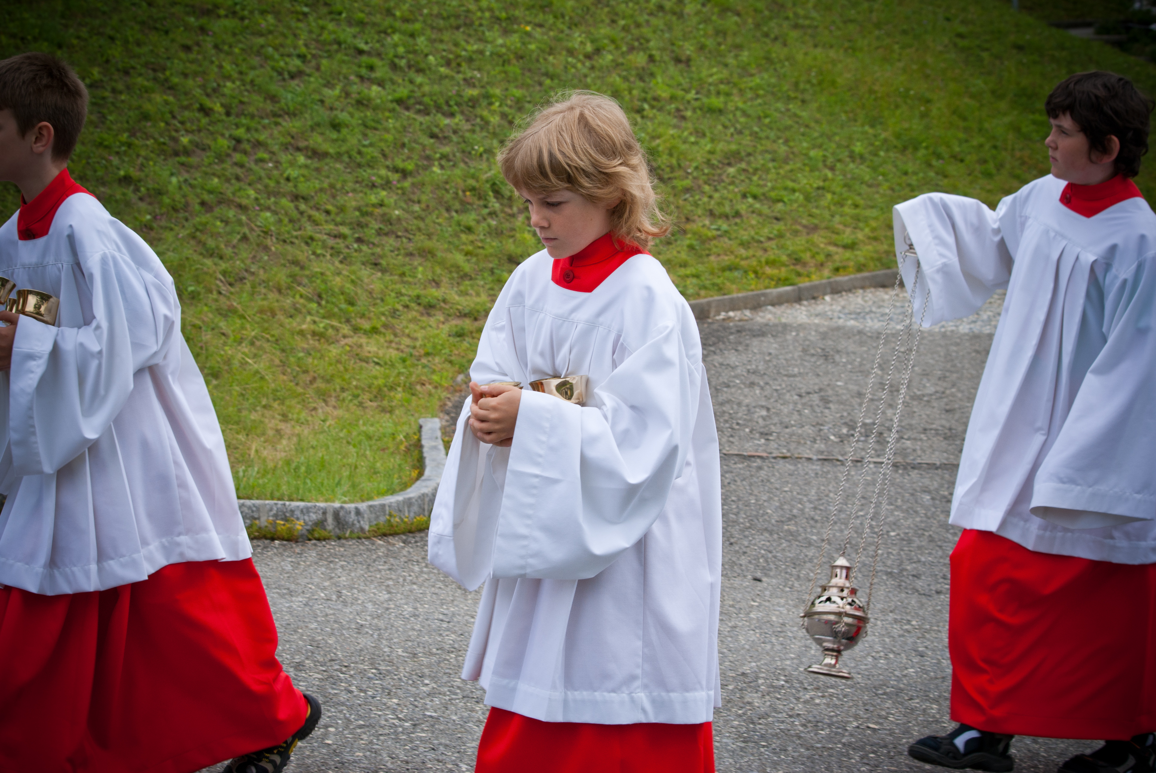 Ministranten bei der Fronleichnamsprozession 2012 in Eschen, Liechtenstein